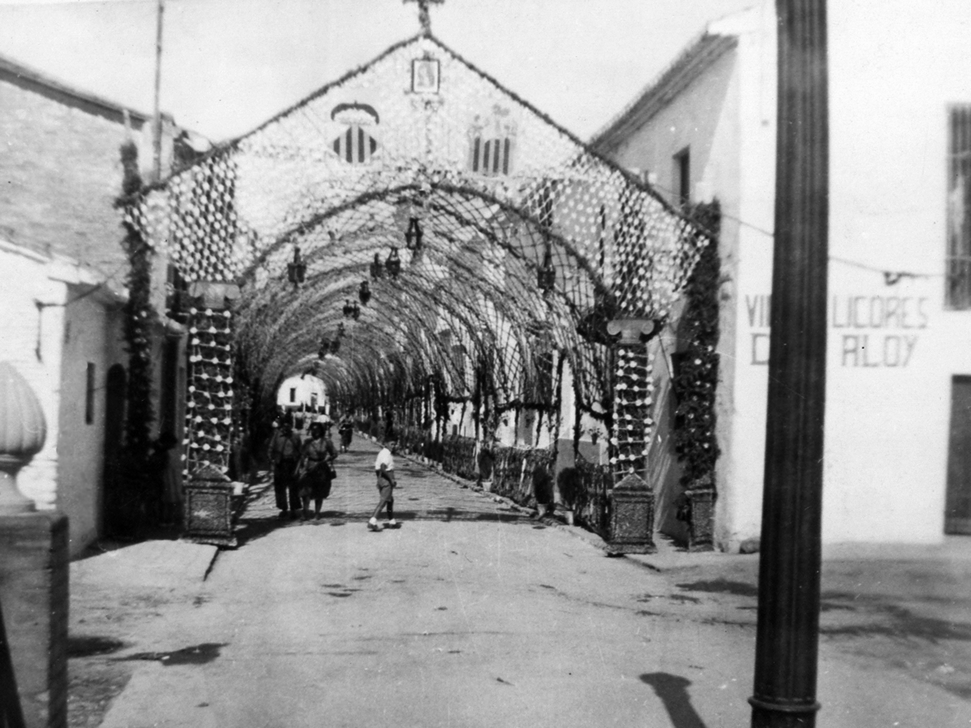 Calle decorada para la ocasión